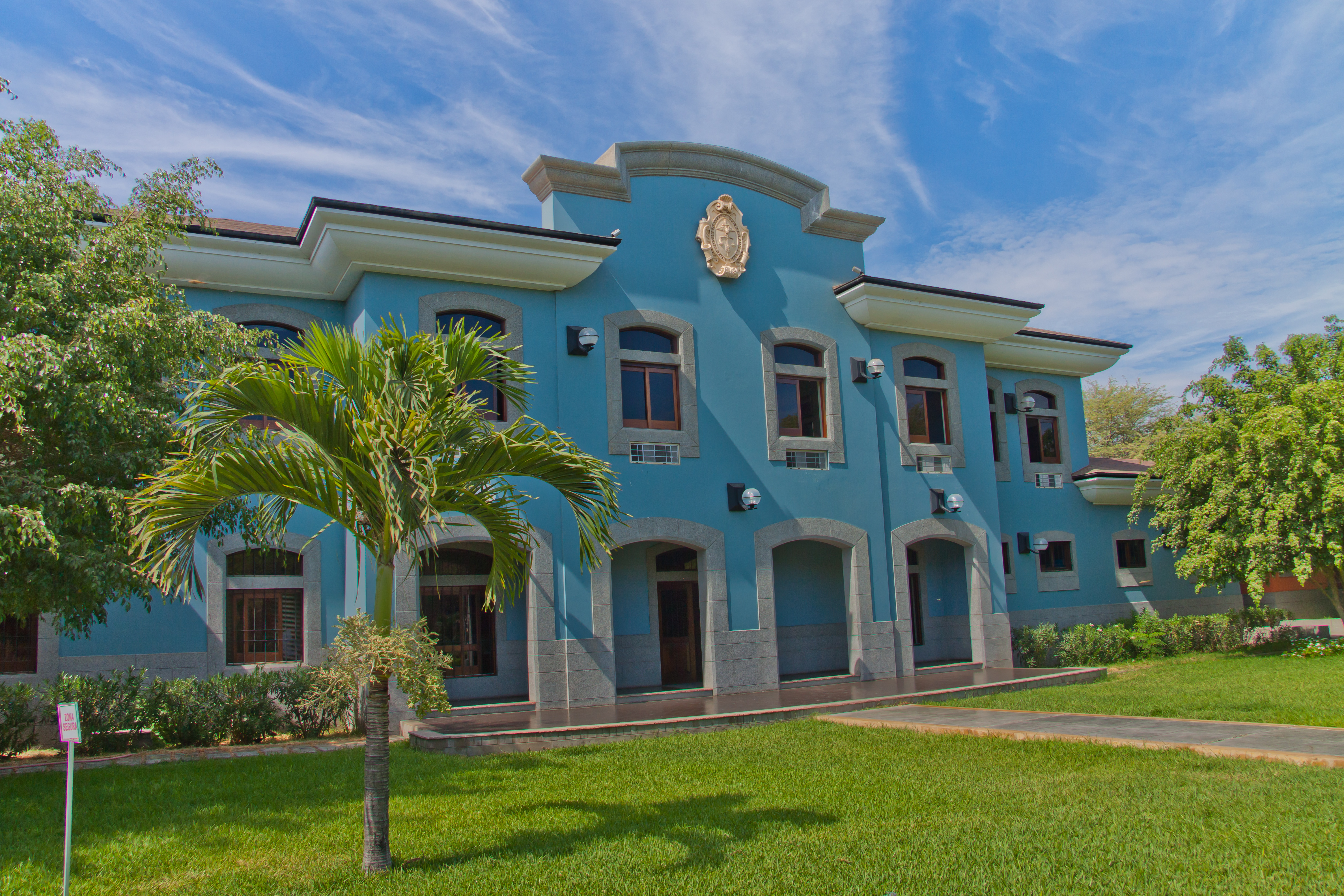 Edificio Administrativo de la Universidad de Piura - UDEP